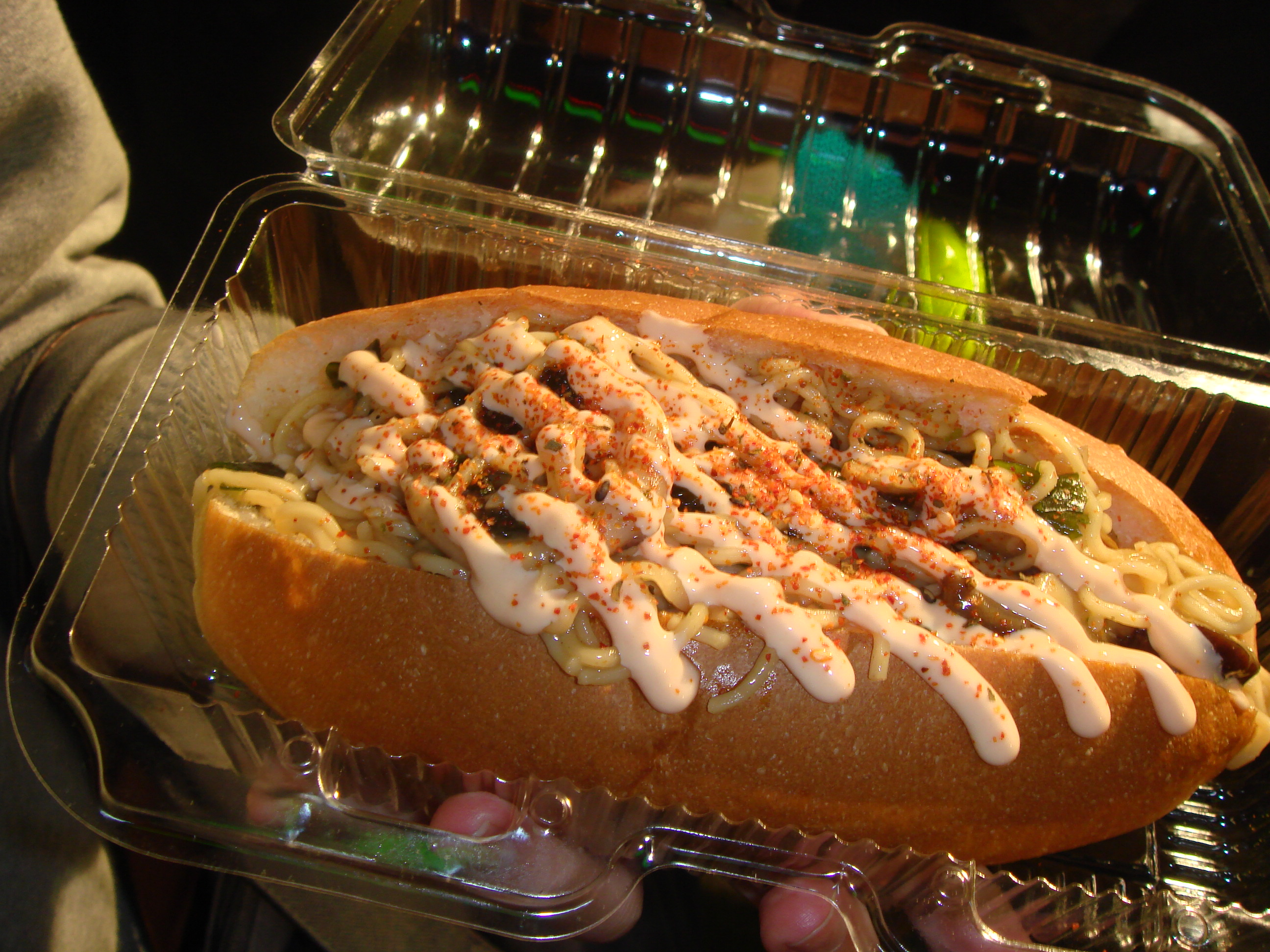 中文（台灣）: 炒麵麵包。